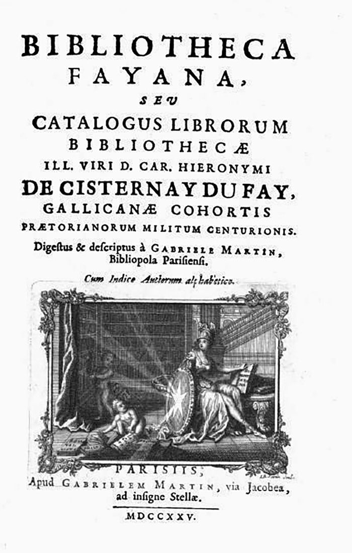 page de livre